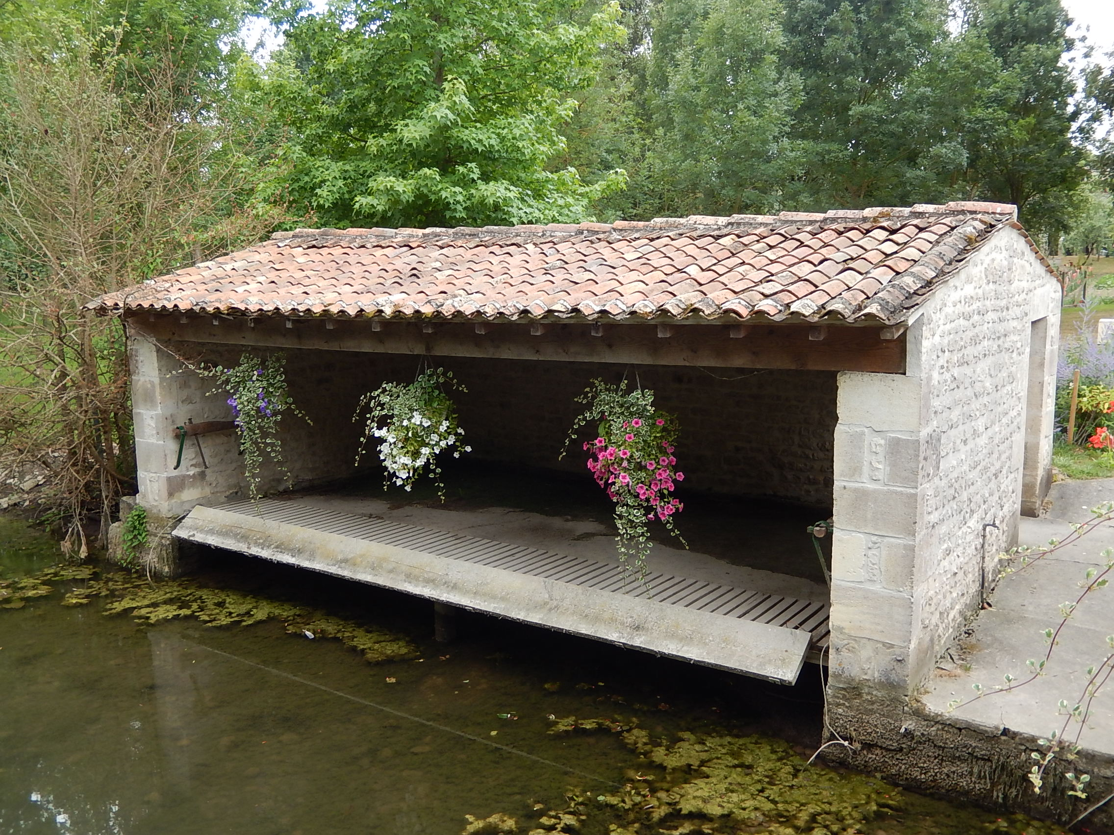 Le lavoir d'Antezant, au bord de la rivière Boutonne.